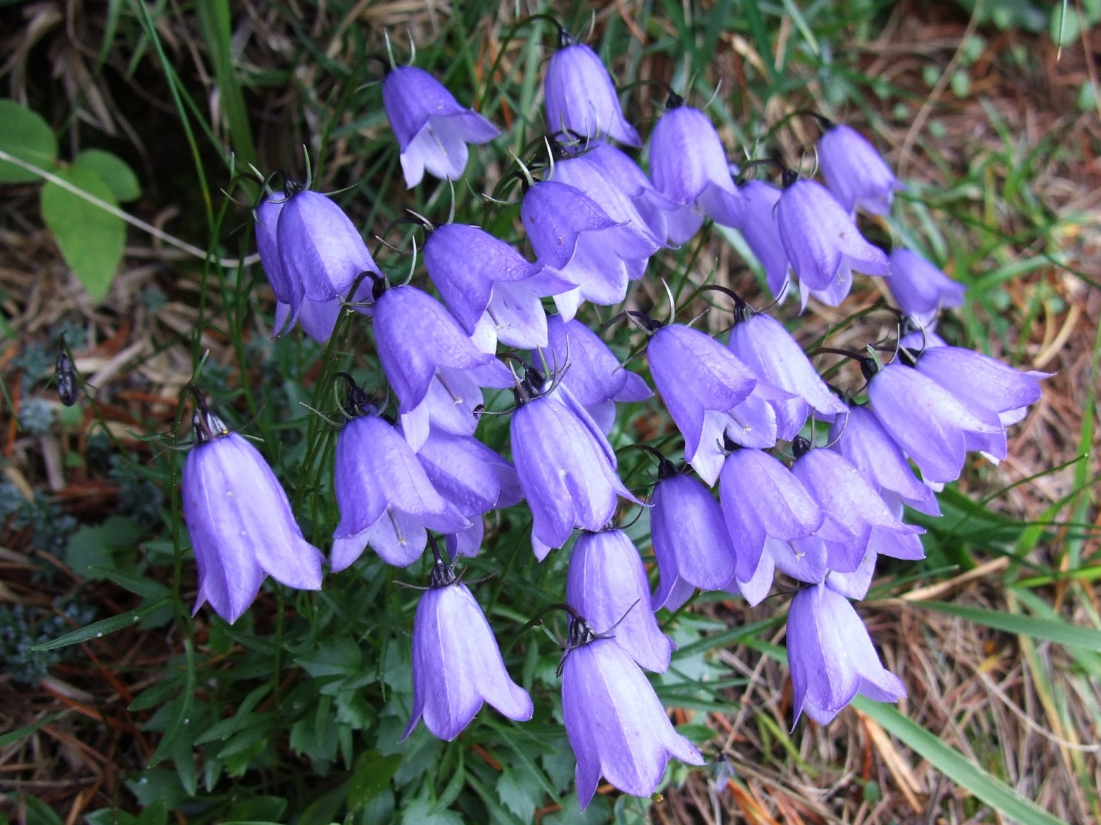 Campanula cochleariifolia